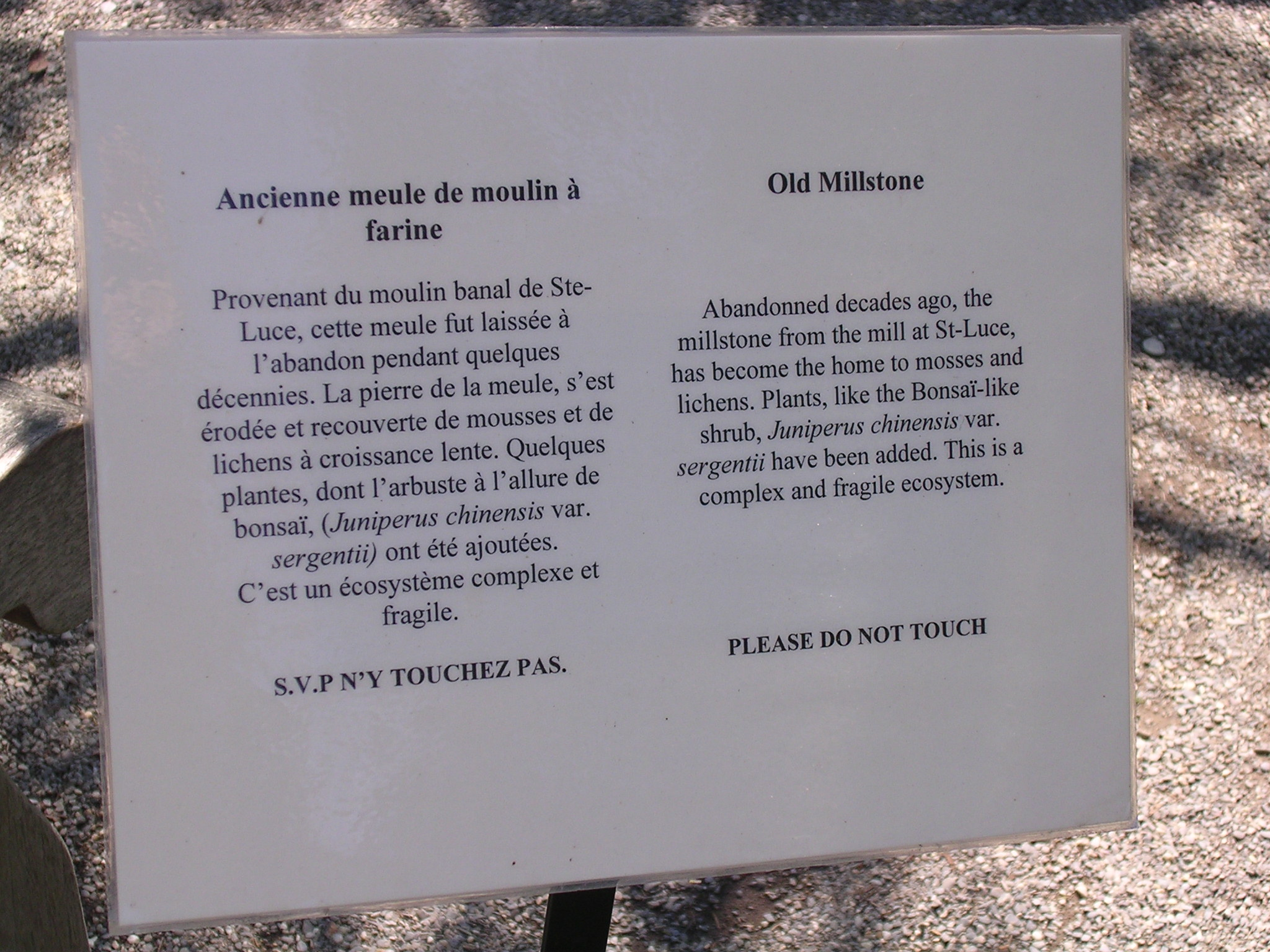 Panneau d'interprétation de la meule aux Jardins de Métis, parc situé à Grand-Métis (Bas-Saint-Laurent, Québec). Cette meule provient du moulin banal du ruisseau à la Loutre, à Sainte-Luce (Bas-Saint-Laurent, Québec). Laissée à l'abandon, elle est recouverte de mousses et de lichens. Quelques plantes, dont l'arbuste à l'allure bonsaï, ont été ajoutées. Redford Gardens; moulin à eau; moulin à farine; meule de pierre.